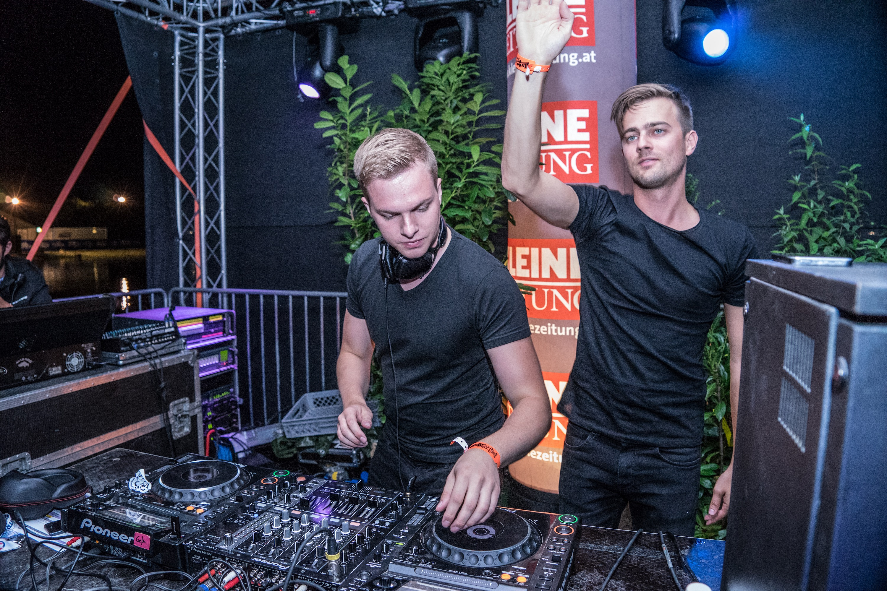 Auftritt auf dem Lake Festival 2015 in Österreich